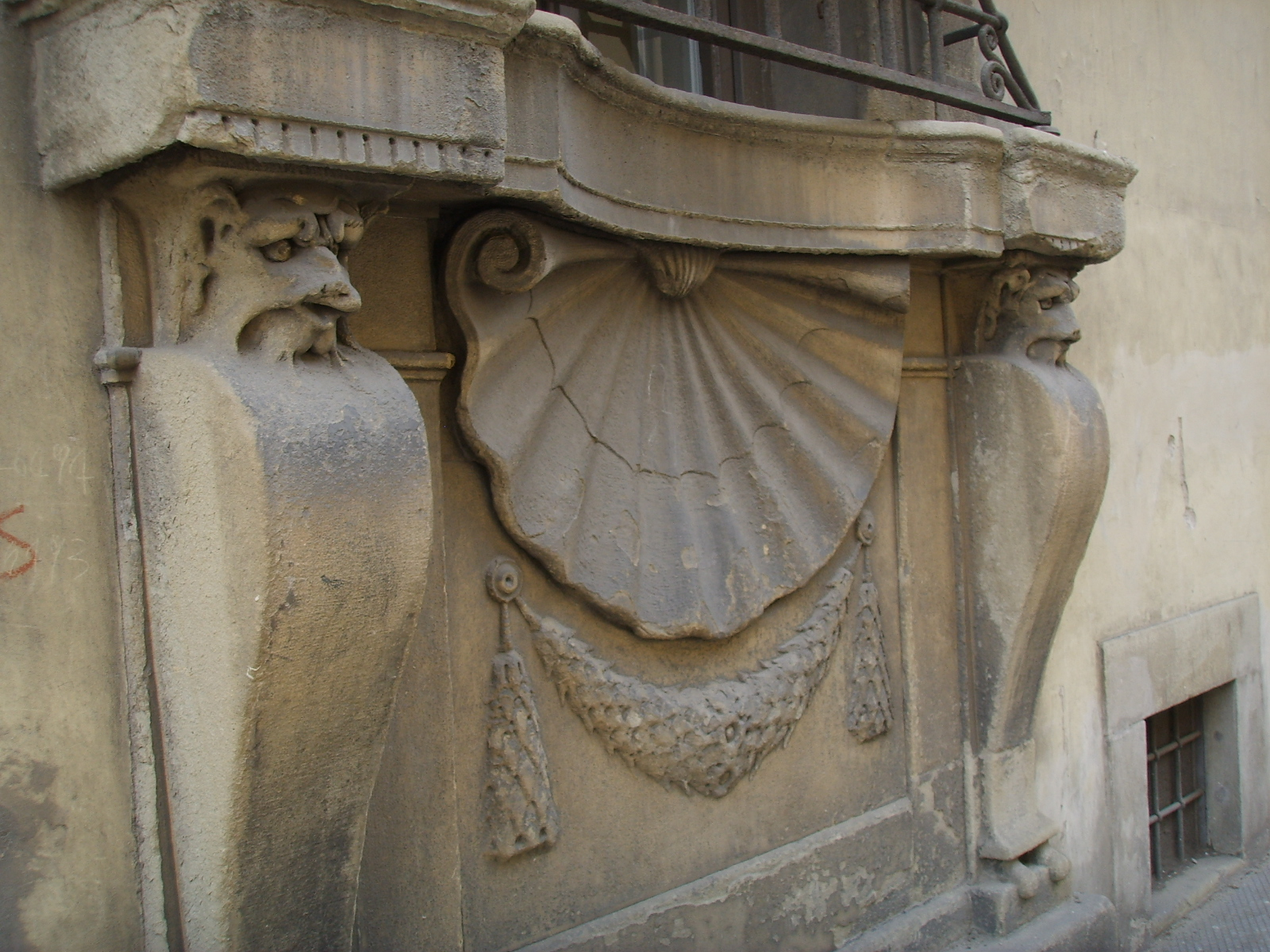 Casino Mediceo di San Marco in Florence, detail